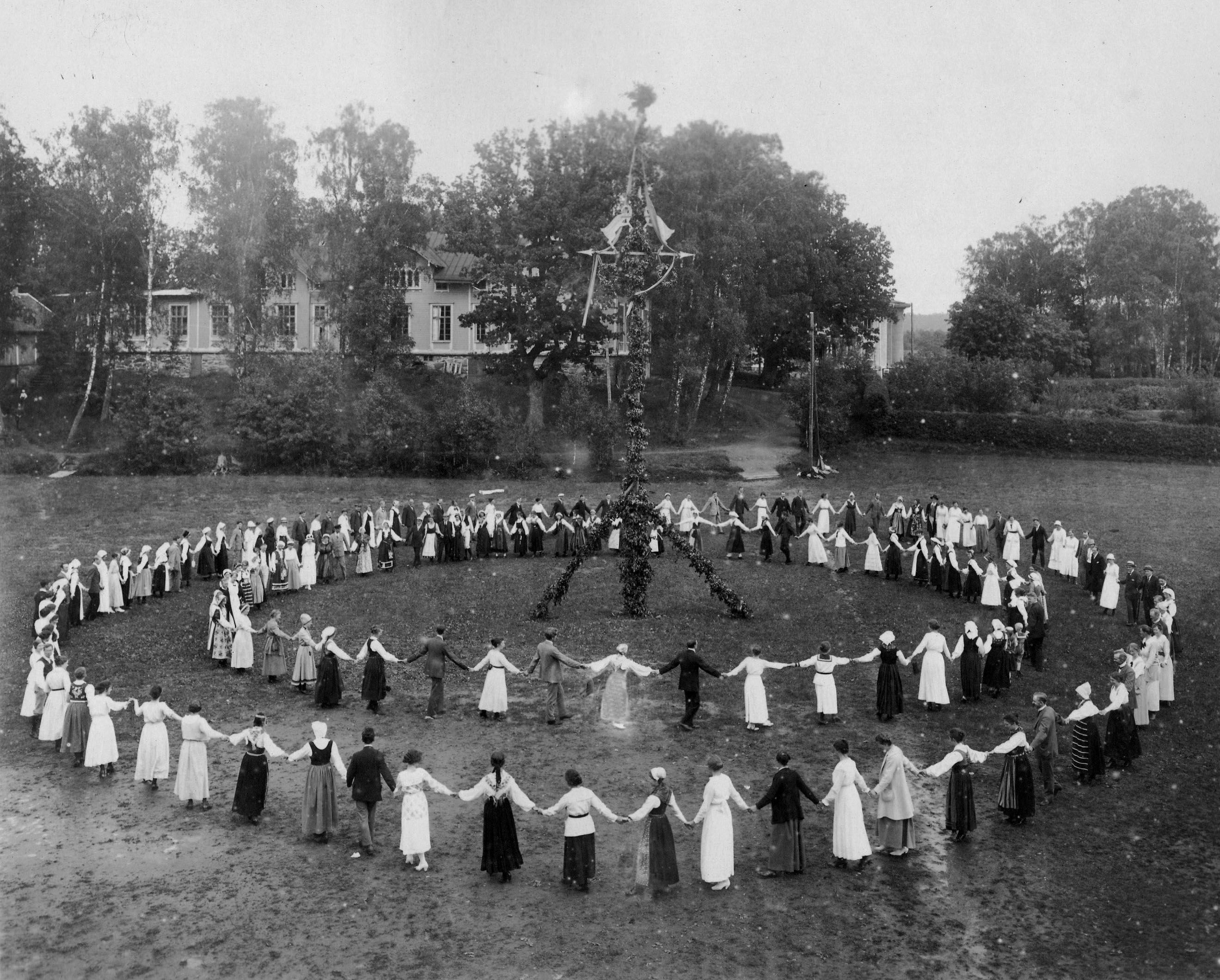 lektion i sånglekar och folkdanser